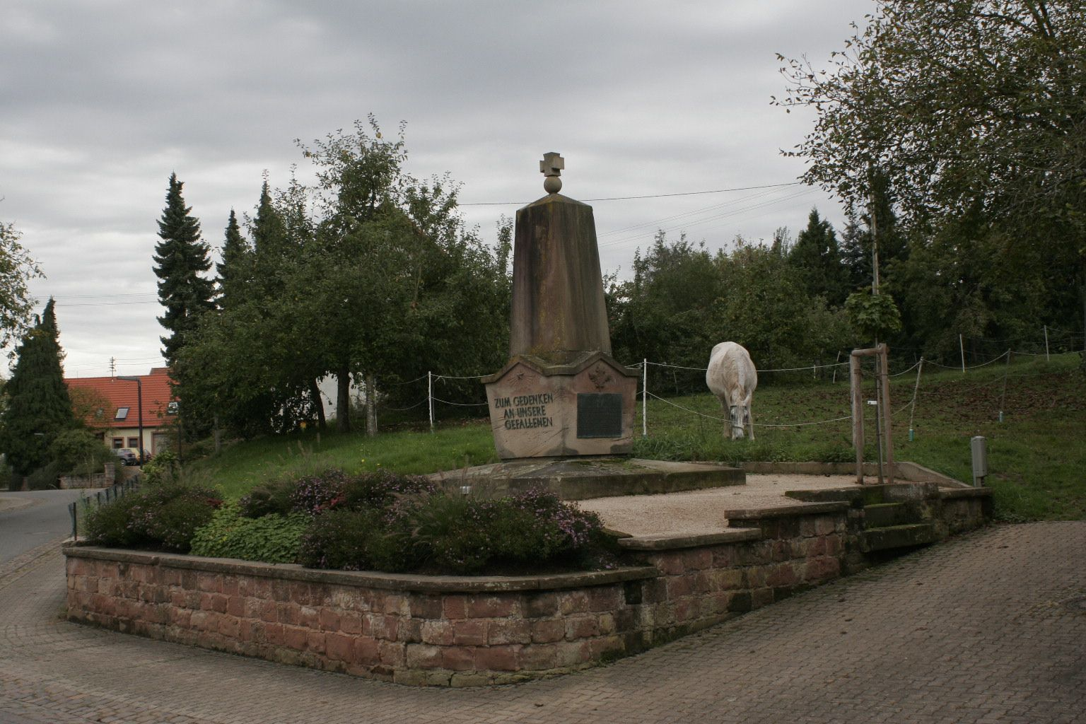 Kriegerdenkmal Kleinbundenbach